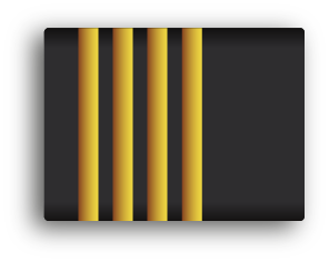 Rangen van de Nederlandse politie, epauletten (schuifpassanten) t.b.v. het huidige en het nieuwe (na 2014) uniform.